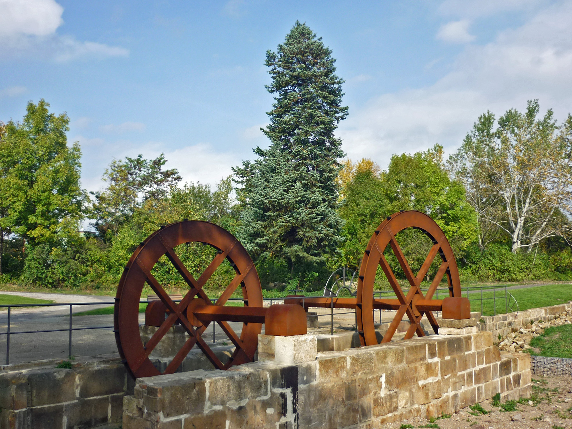 Der neue "Pulvermühlenpark" zwischen Oederaner Straße und Fabrikstraße in Dresden-Löbtau auf dem Gelände der ehemaligen Pulvermühle. Zwei Silhouettenmühlräder am ehemaligen Weißeritz-Mühlgraben veranschaulichen den Standort der alten kurfürstlichen Pulvermühle.